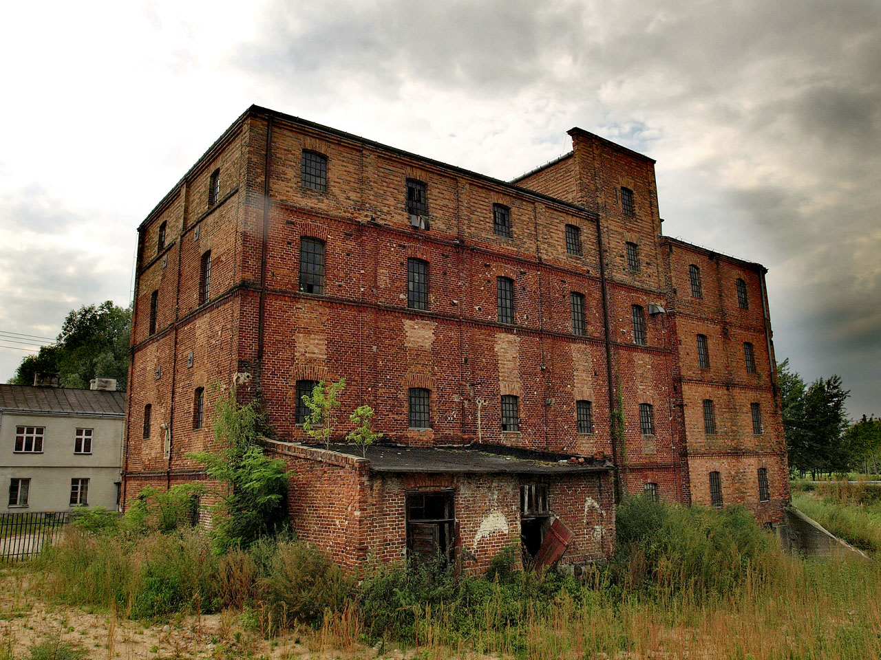 Stary opuszczony młyn we wsi Młyn Strugiennicki